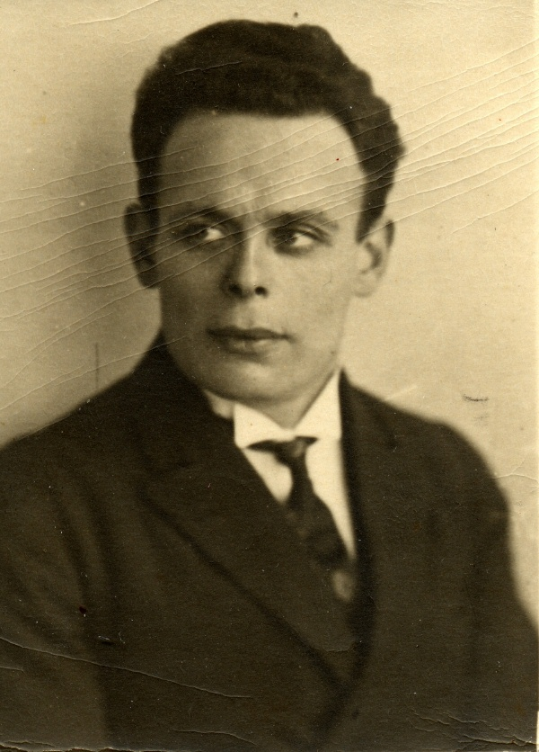 Nahum Gergel, 1929, Berlin, Germany